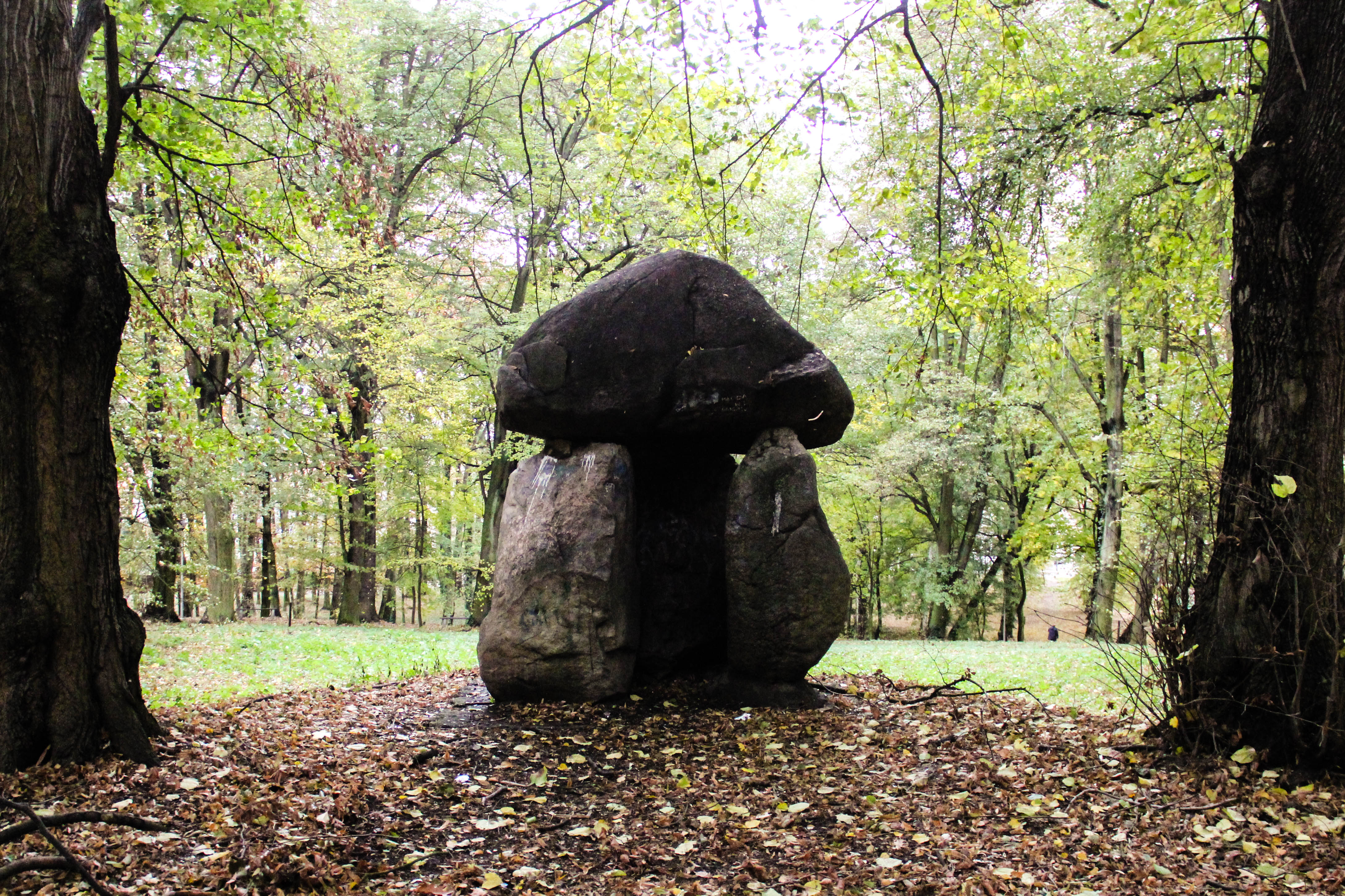 Heldendenkmal - pomnik upamiętniający żołnierzy poległych na frontach I wojny światowej, ze względu na swój charakterystyczny kształt nazywany "Grzybkiem".